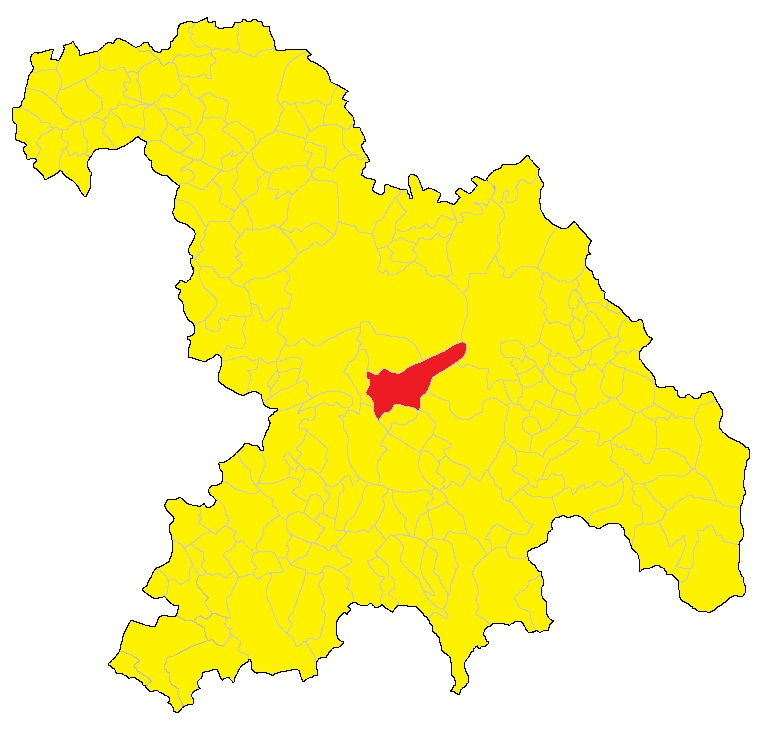 Map of comune of Bosco Marengo (AL).